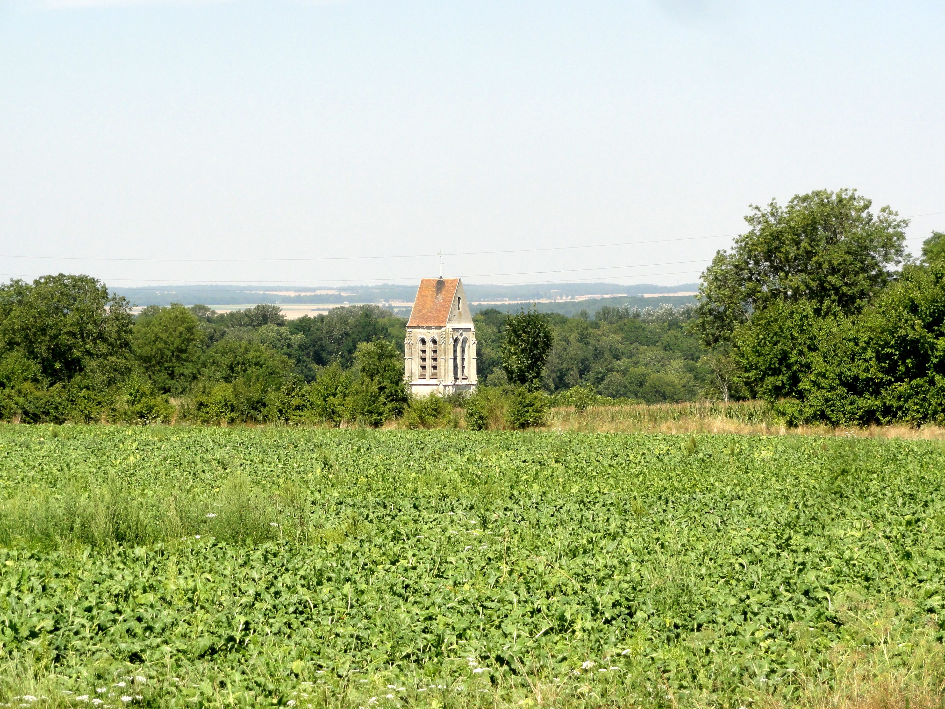 Clocher, vue de loin depuis le plateau.